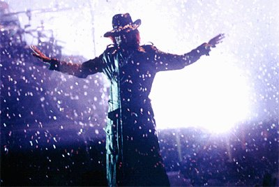 Marilyn Manson singing ”Coma White” 1999